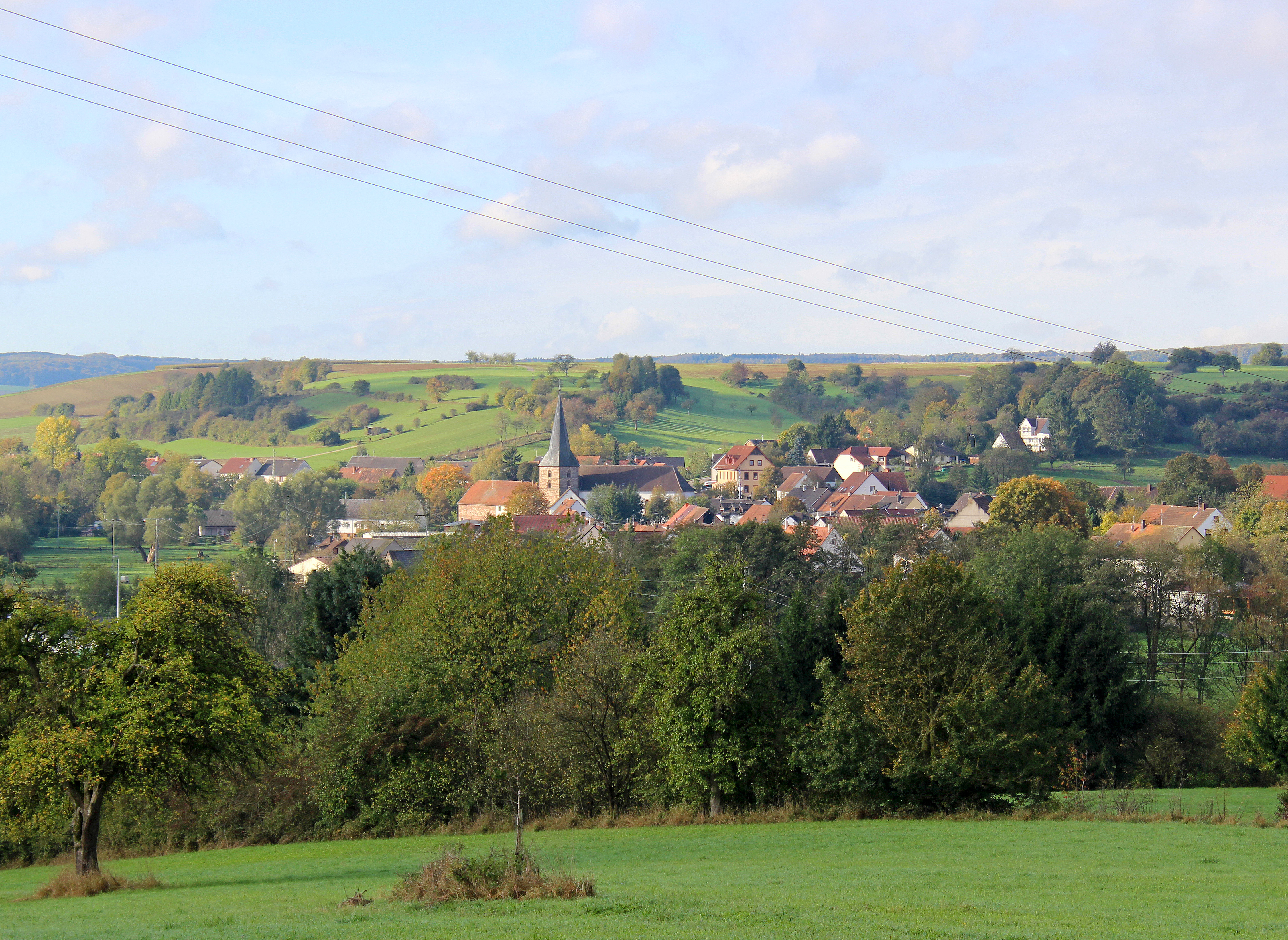 Blick auf Altheim, Stadt Blieskastel, Saarpfalz-Kreis, Saarland